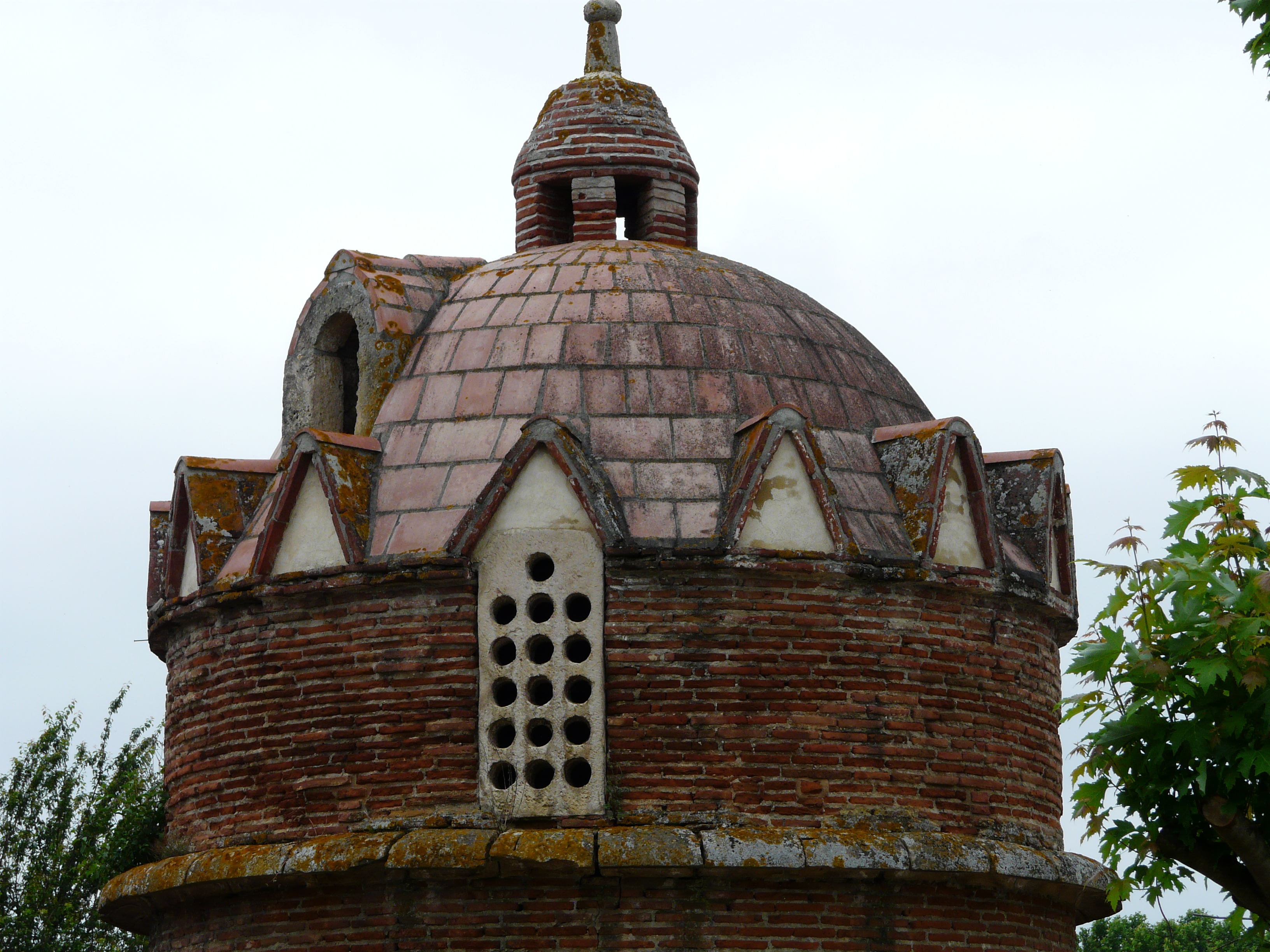 Le toit du colombier du Grilhon, Carbonne, Haute-Garonne, France.